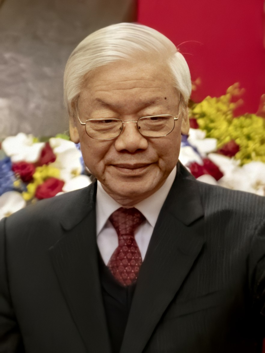 Doanld Trump and Nguyễn Phú Trọng in Hanoi, 2019